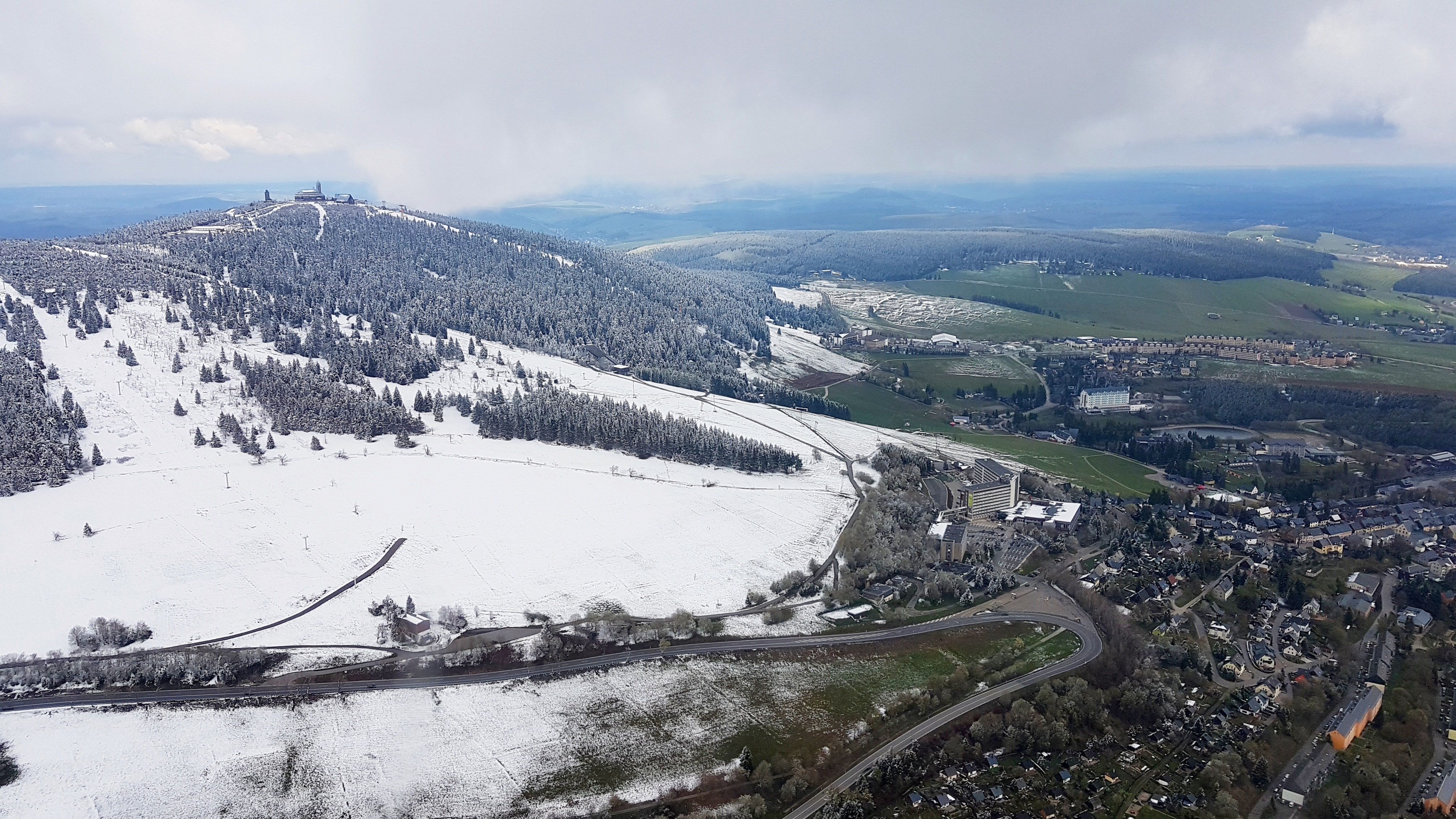 Aufgenommen aus einem Flugzeug am 05.05.2019. (Keine Fotomontage, lediglich Kontrast und Sättigung wurden leicht angepasst.)